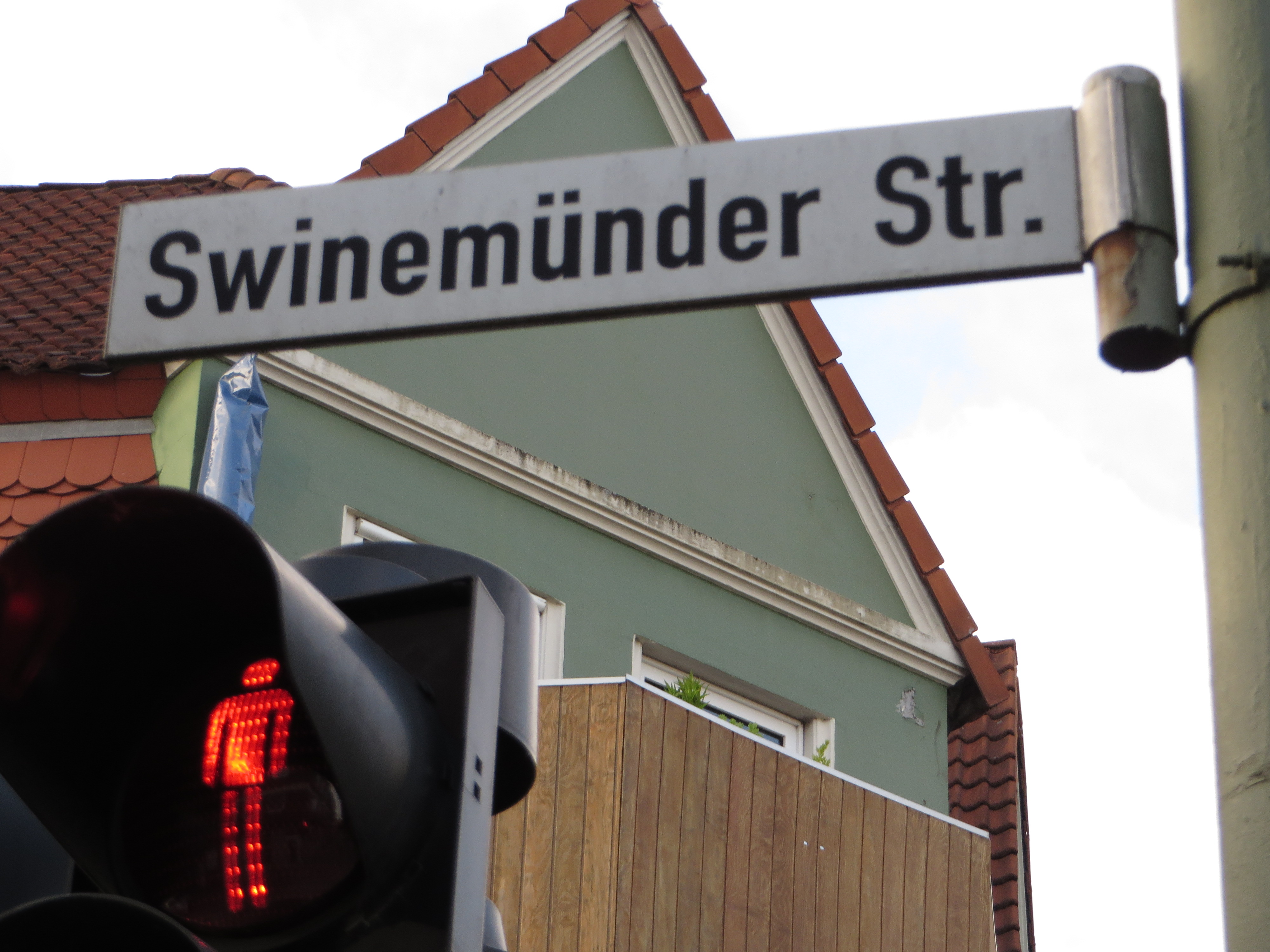 Straßenschild Swinemünder Straße (Flensburg), Bild 02